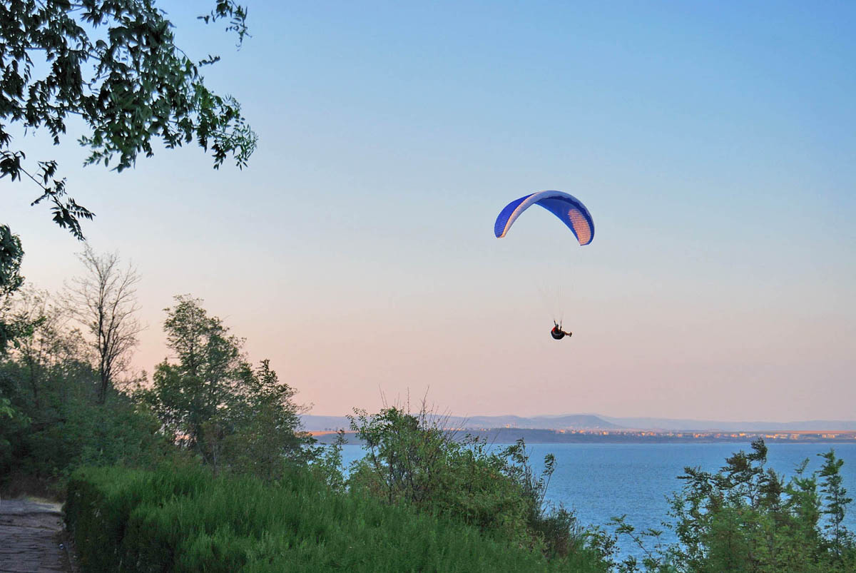 Парапланеризъм в морската градина на Бургас. Deutsch Gleitschirmfliegen über den Meeresgarten in Burgas, Bulgarien